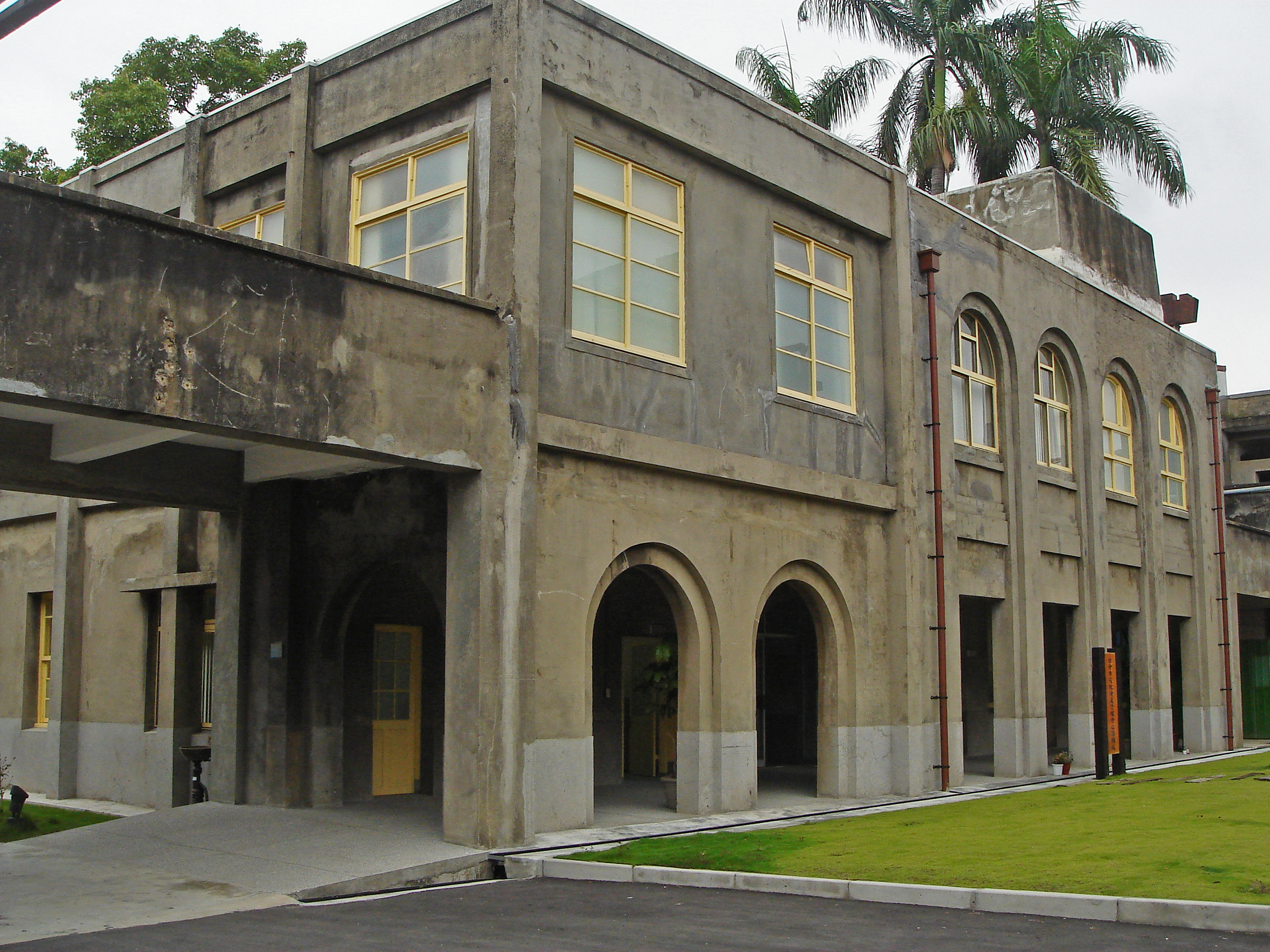 中文（台灣）: 台中市文化資產處址